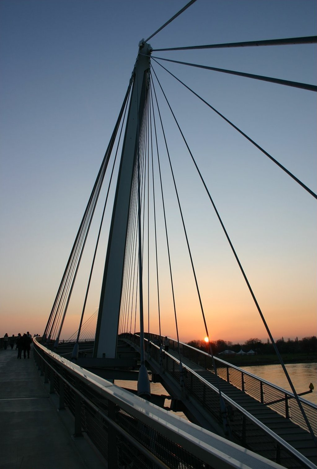 Der Steg der zwei Ufer (passerelle Mimram) zwischen Straßburg und Kehl; von Kehl aus gesehen.